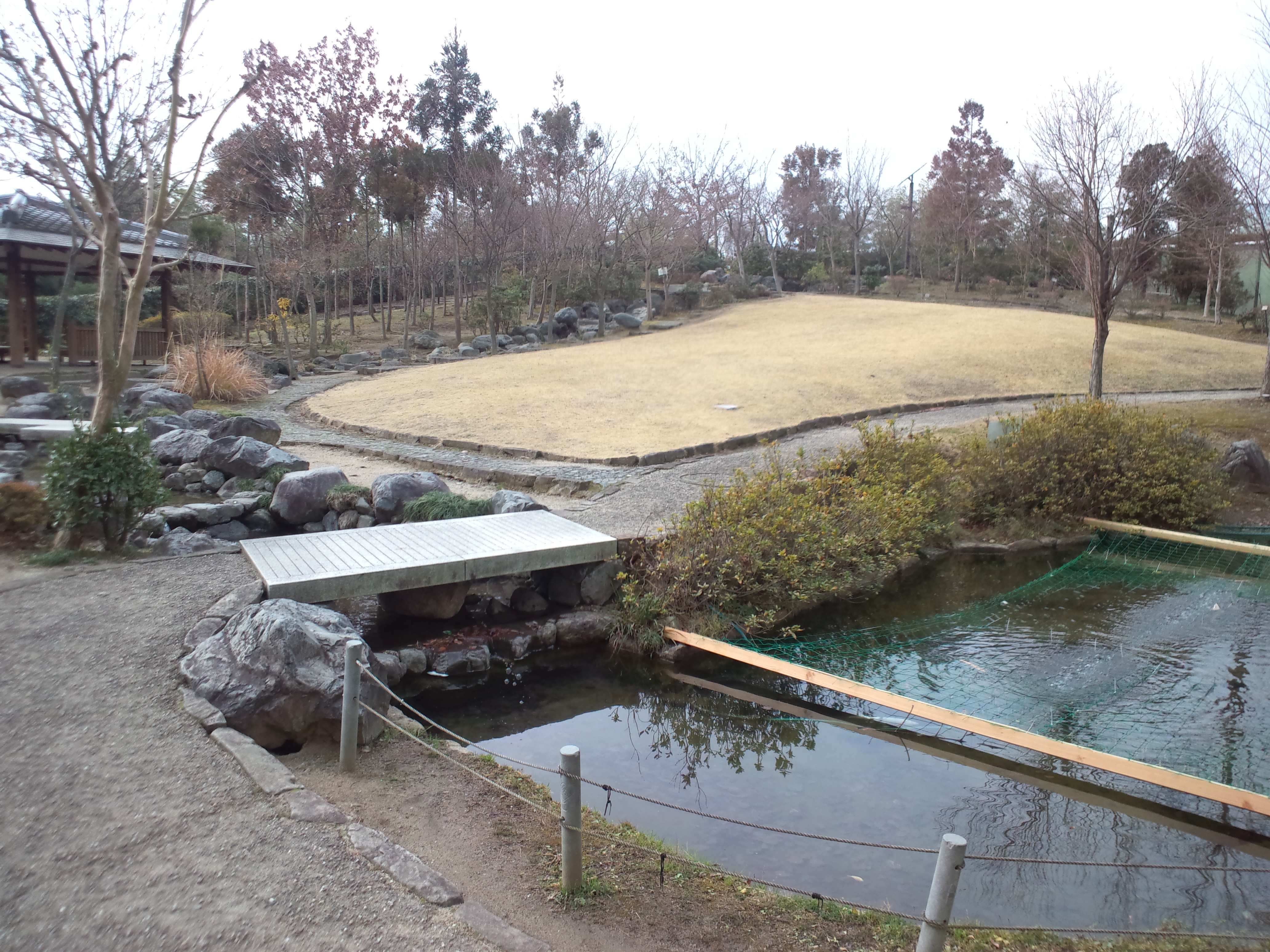 道の駅ガレリアかめおか 庭園